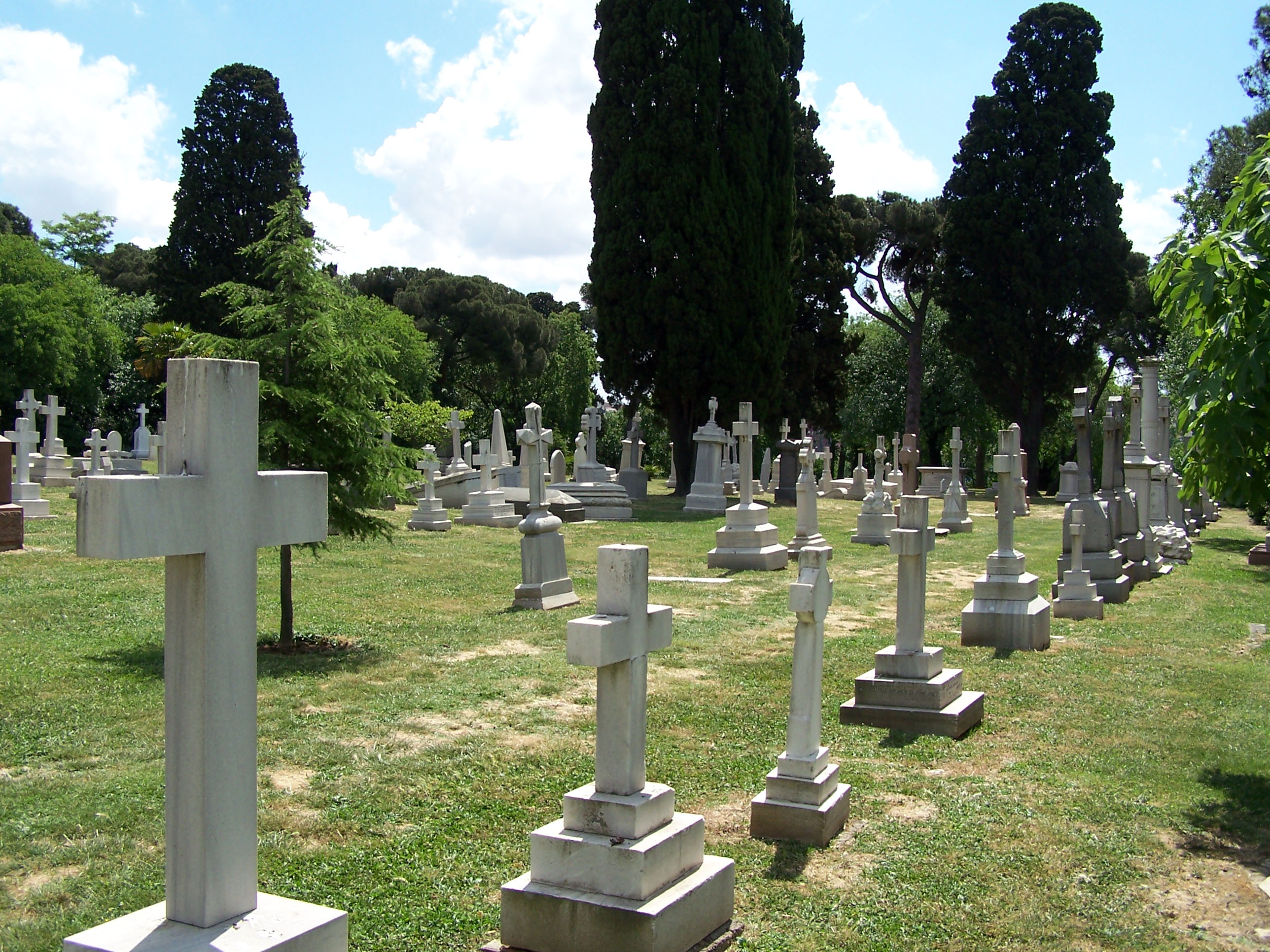 Graves at Haydarpaşa Mezarlığı